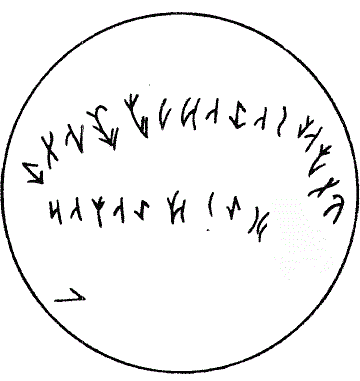 Issyk Dish